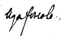 Autografo di Foscolo a pag.2 del libro Lettere di Jacopo Ortis